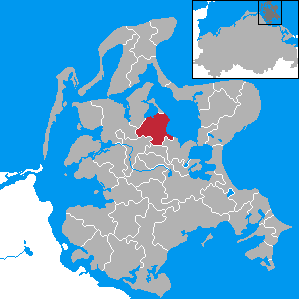 Rappin, Landkreis Rügen, Mecklenburg-Vorpommern